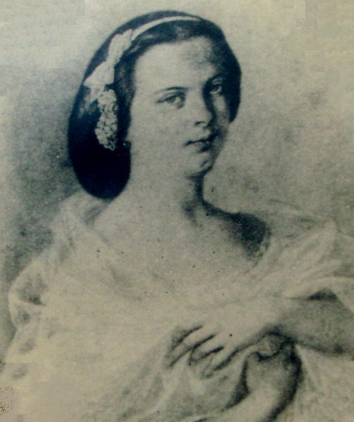 Portrait de Claire Nouvion, née Chassériau par Hippolyte Lazerges Fille du baron Charles-Frédéric Chassériau, architecte en chef de la ville d'Alger